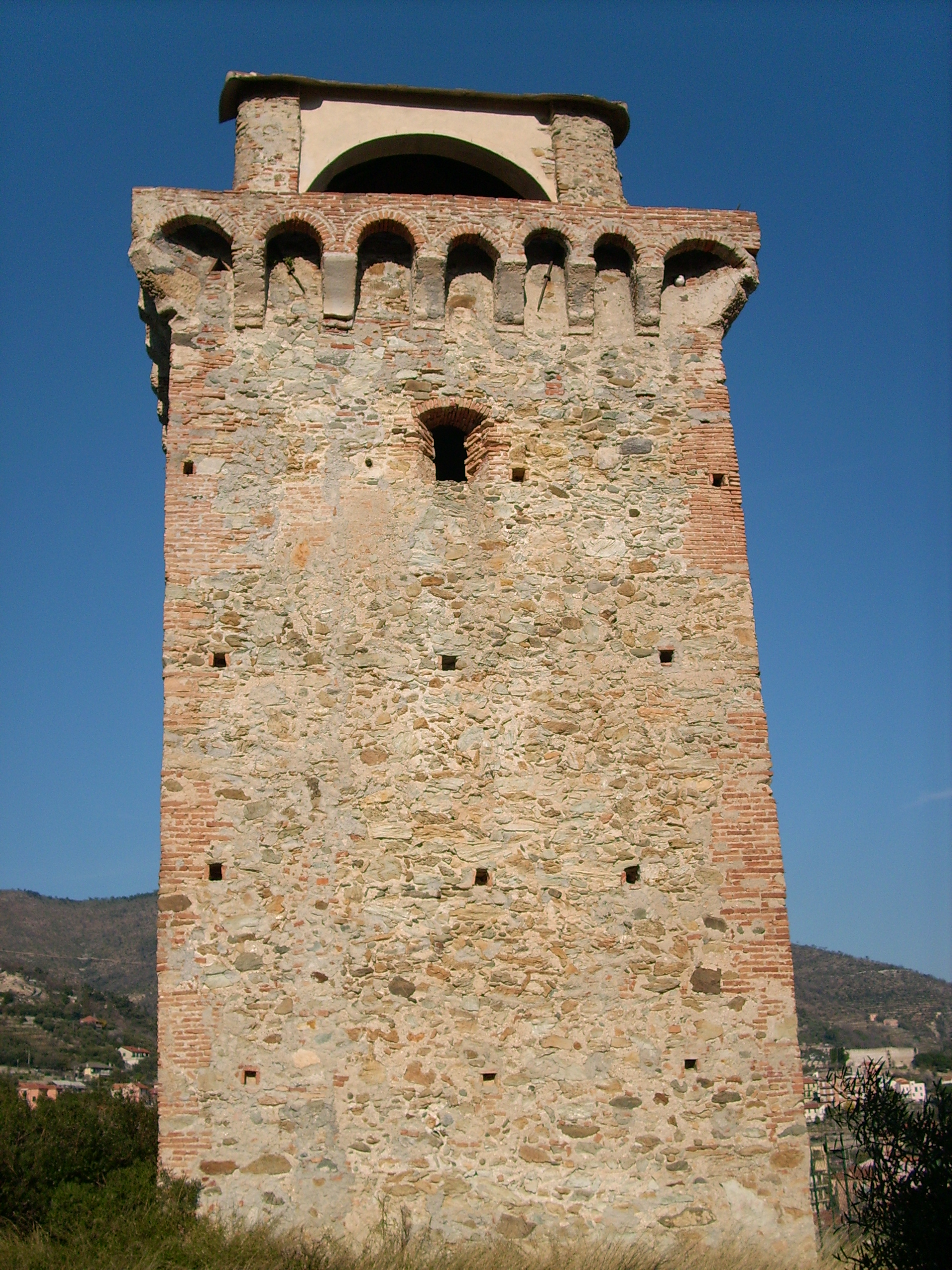 Torre Coreallo di Spotorno, Liguria, Italy